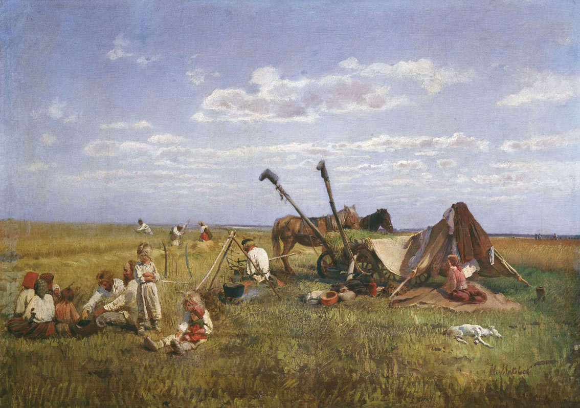 Rest At Harvest